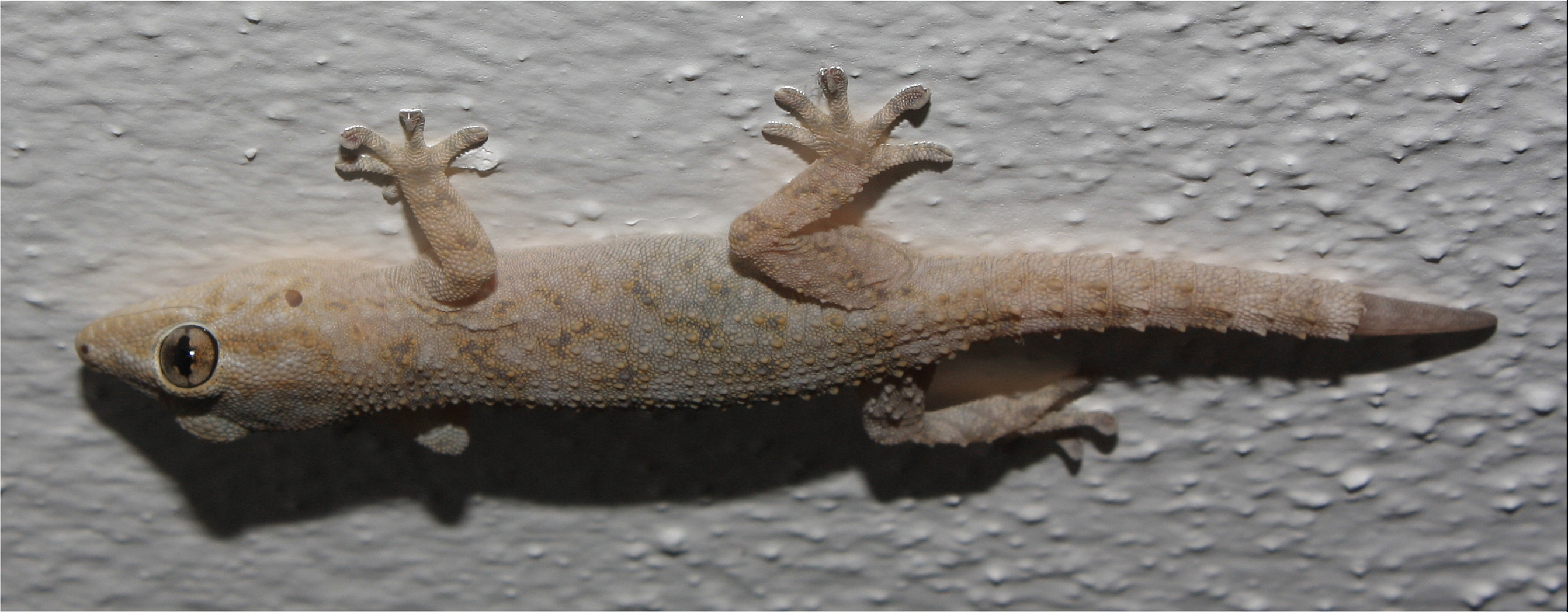 Tarentola delandii